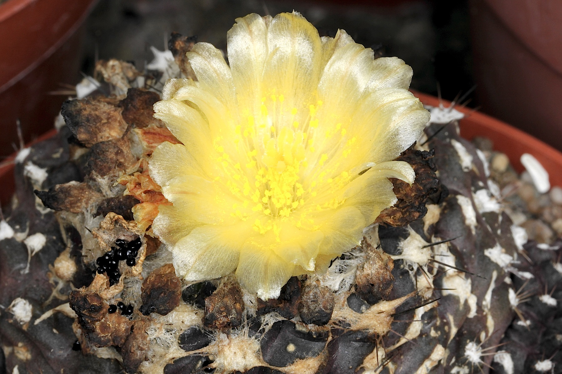 Copiapoa humilis ssp. tenuissima